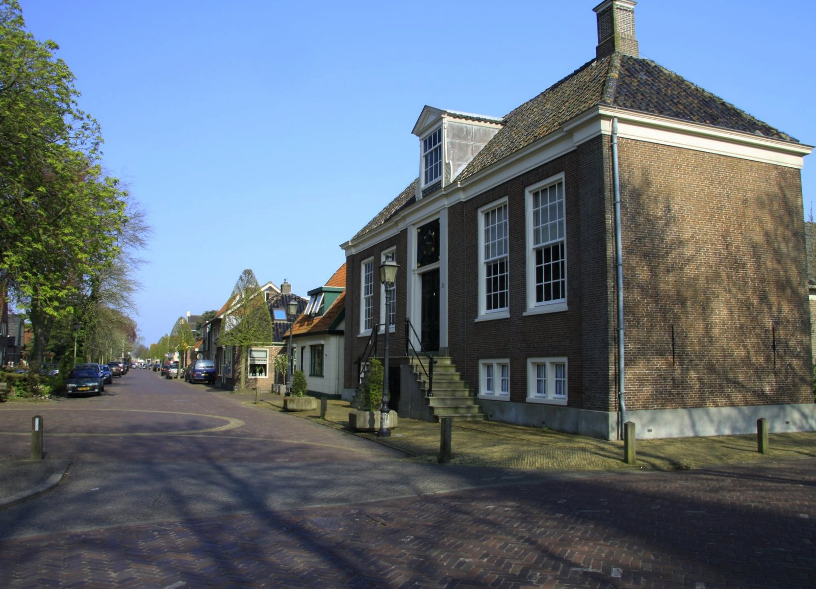 Hoogwoud in West Friesland op een mooie voorjaarsdag.